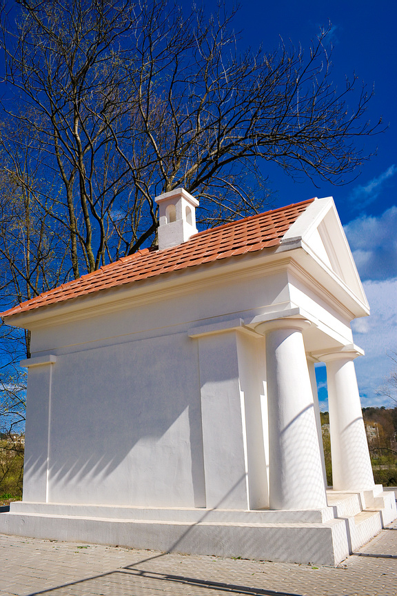 Tuskulenai manor chapel